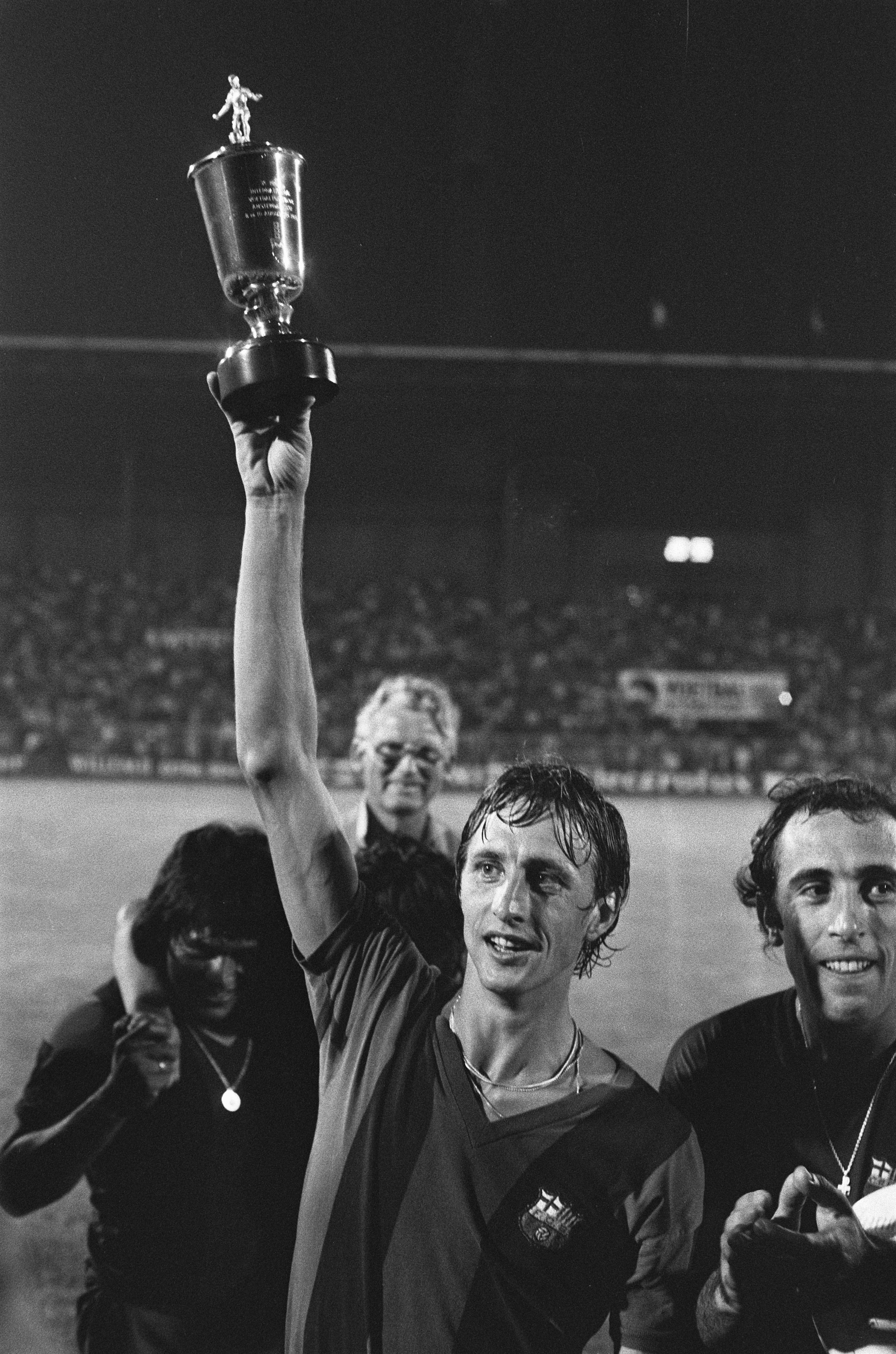 Collectie / Archief : Fotocollectie Anefo Reportage / Serie : Voetbaltoernooi Amsterdam-700 Beschrijving : Cruijff met de beker van de derde prijs Datum : 10 augustus 1975 Locatie : Amsterdam, Noord-Holland Trefwoorden : prijsuitreikingen, toernooien, voetbal Persoonsnaam : Cruijff, Johan Instellingsnaam : AJAX Fotograaf : Fotograaf Onbekend / Anefo Auteursrechthebbende : Nationaal Archief Materiaalsoort : Negatief (zwart/wit) Nummer archiefinventaris : bekijk toegang 2.24.01.05 Bestanddeelnummer : 928-0928